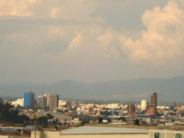 Panorámica desde el periférico de San Luis Potosí.